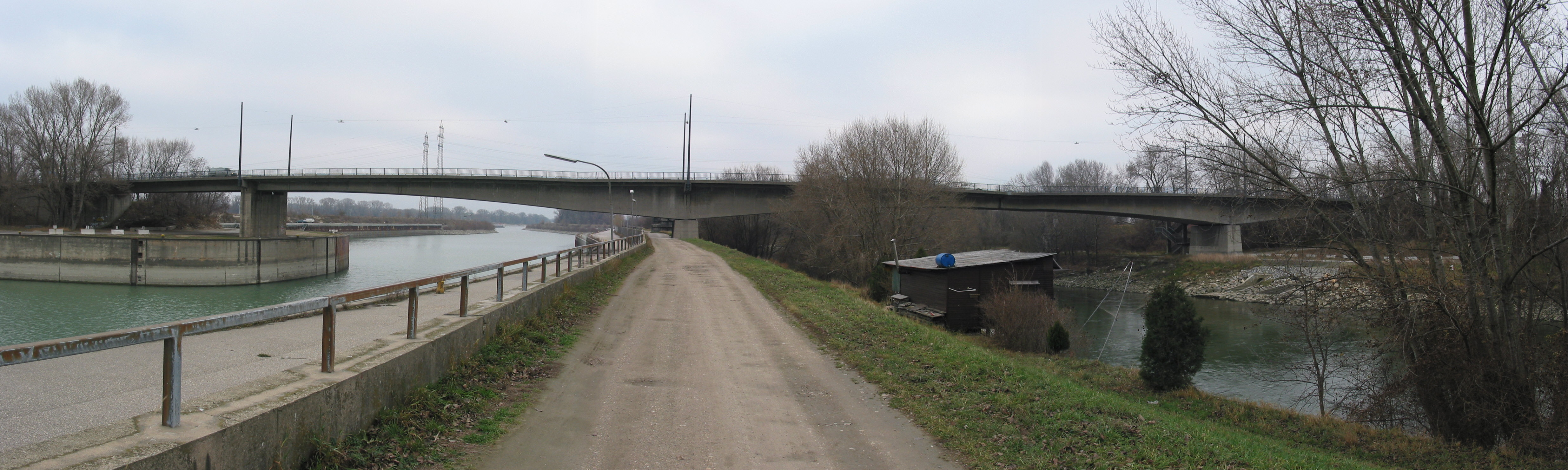 Freudenauer Hafenbrücke 2006-12-23 own work